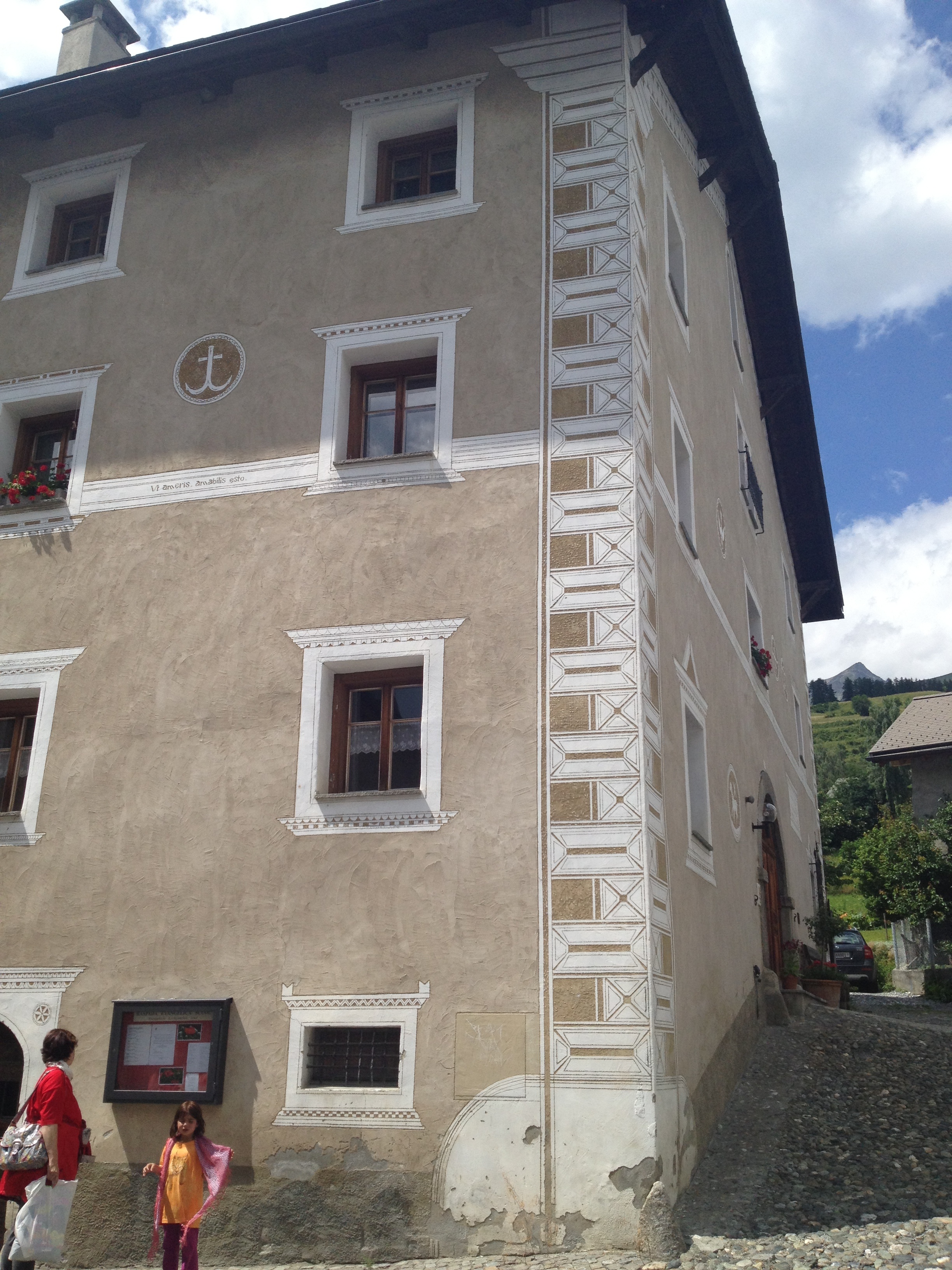 Das Pfarrhaus in Scuol (Unterengadin, Kanton Graubünden)